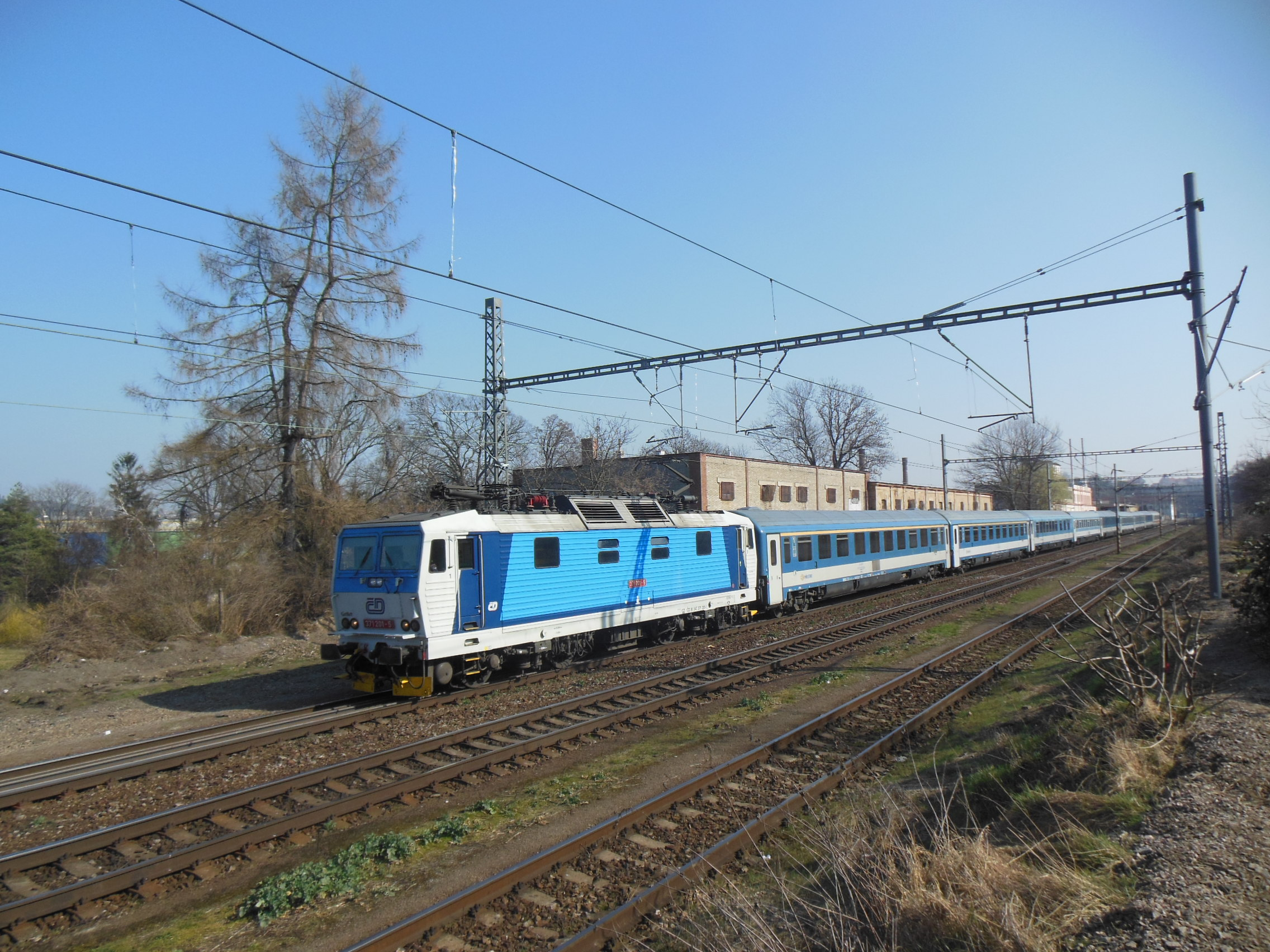 Praha-Bubeneč. Elektrická lokomotiva 371 na trati 091 v úseku Bubeneč-Podbaba.